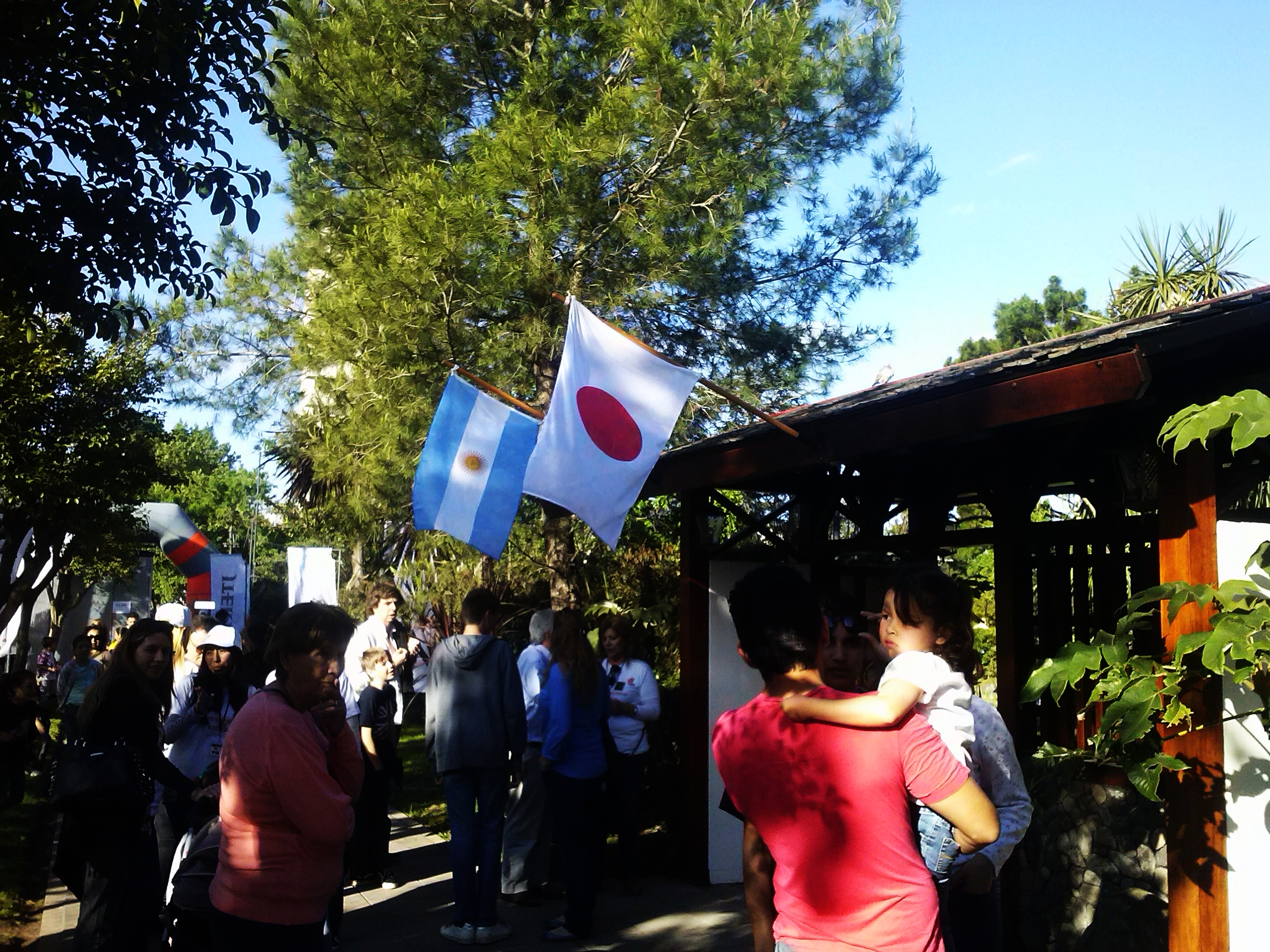 Entrada al Jardín Japonés de Belén de Escobar, Buenos Aires, Argentina.